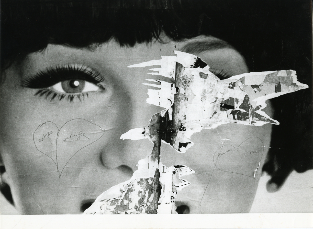 Serie fotografica : Venezia, 1971 / Paolo Monti. - Stampe: 8 : Positivo b/n, gelatina bromuro d'argento/ carta, 24x30. - ((Al verso delle stampe manoscritto: "Venezia - manifesto - 1971", "Venezia - manifesto - maggio 1968", "Manifesto strappato 1971". Al verso delle stampe manoscritto numero di negativo corrispondente: 538/23, 538/25, 538/27, 538/29, 538/31, 538/35, 538/37. Sul coperchio della scatola, manoscritto a pennarello: "Manifesti strappati"